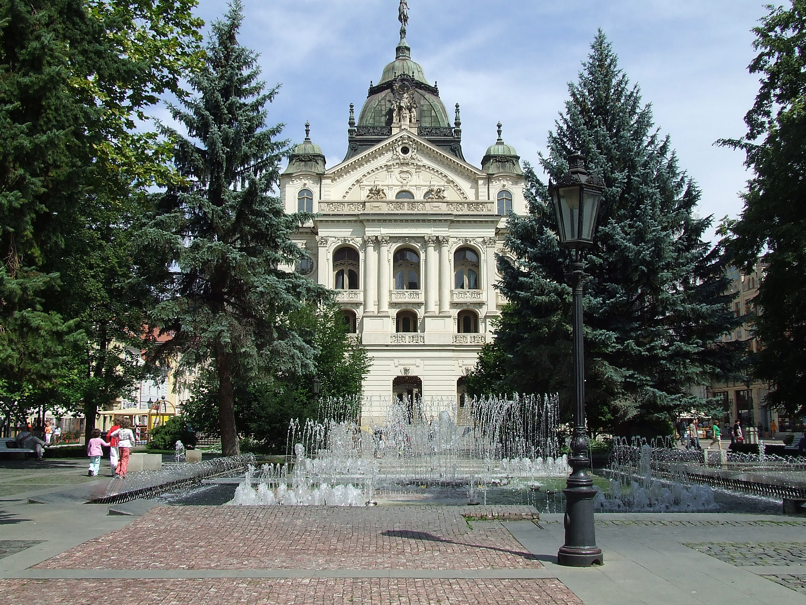 Štátne divadlo v Košiciach